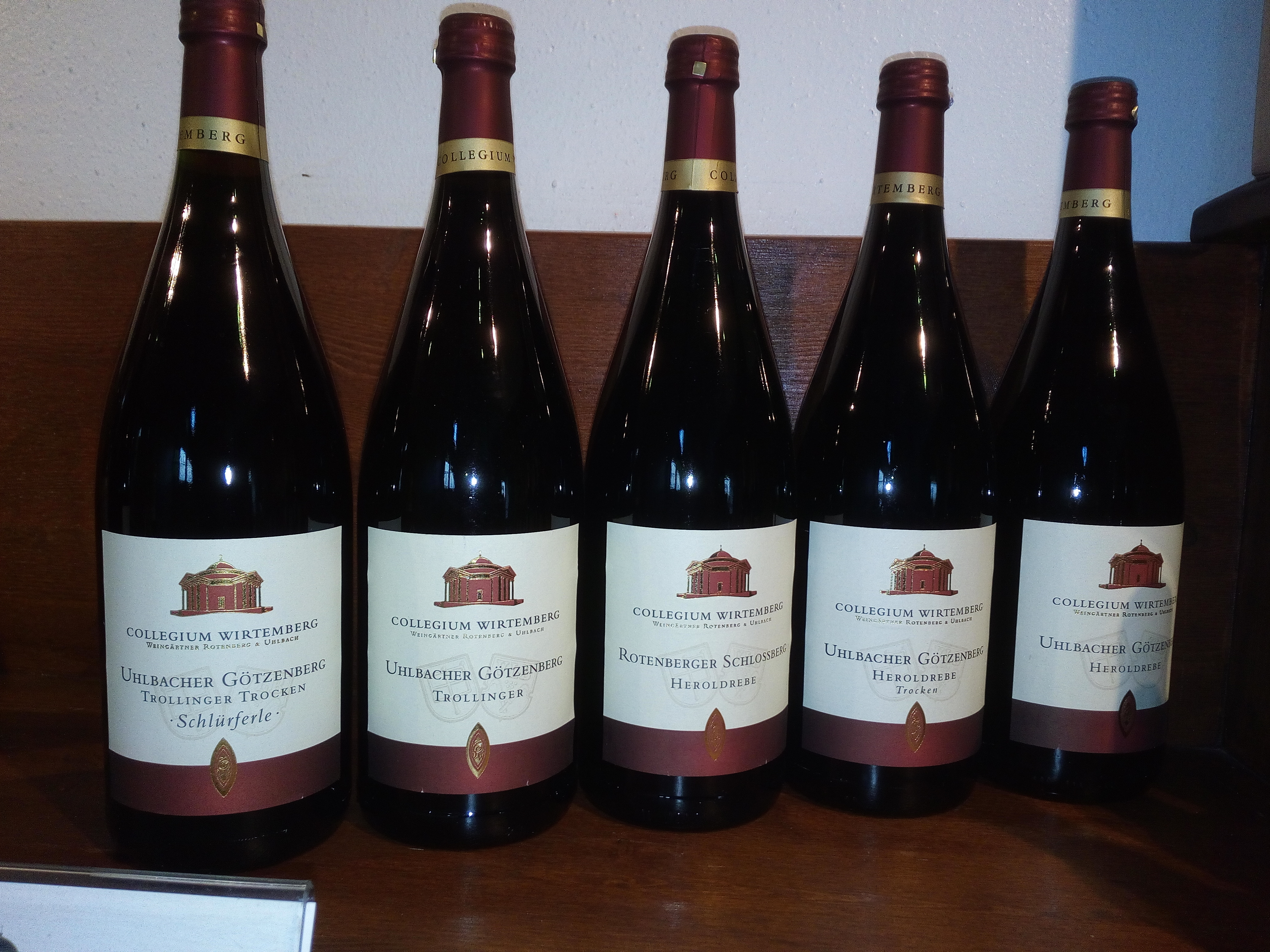 Weinflaschen aus dem Sortiment der Weingärtnergenossenschaft Collegium Wirtemberg